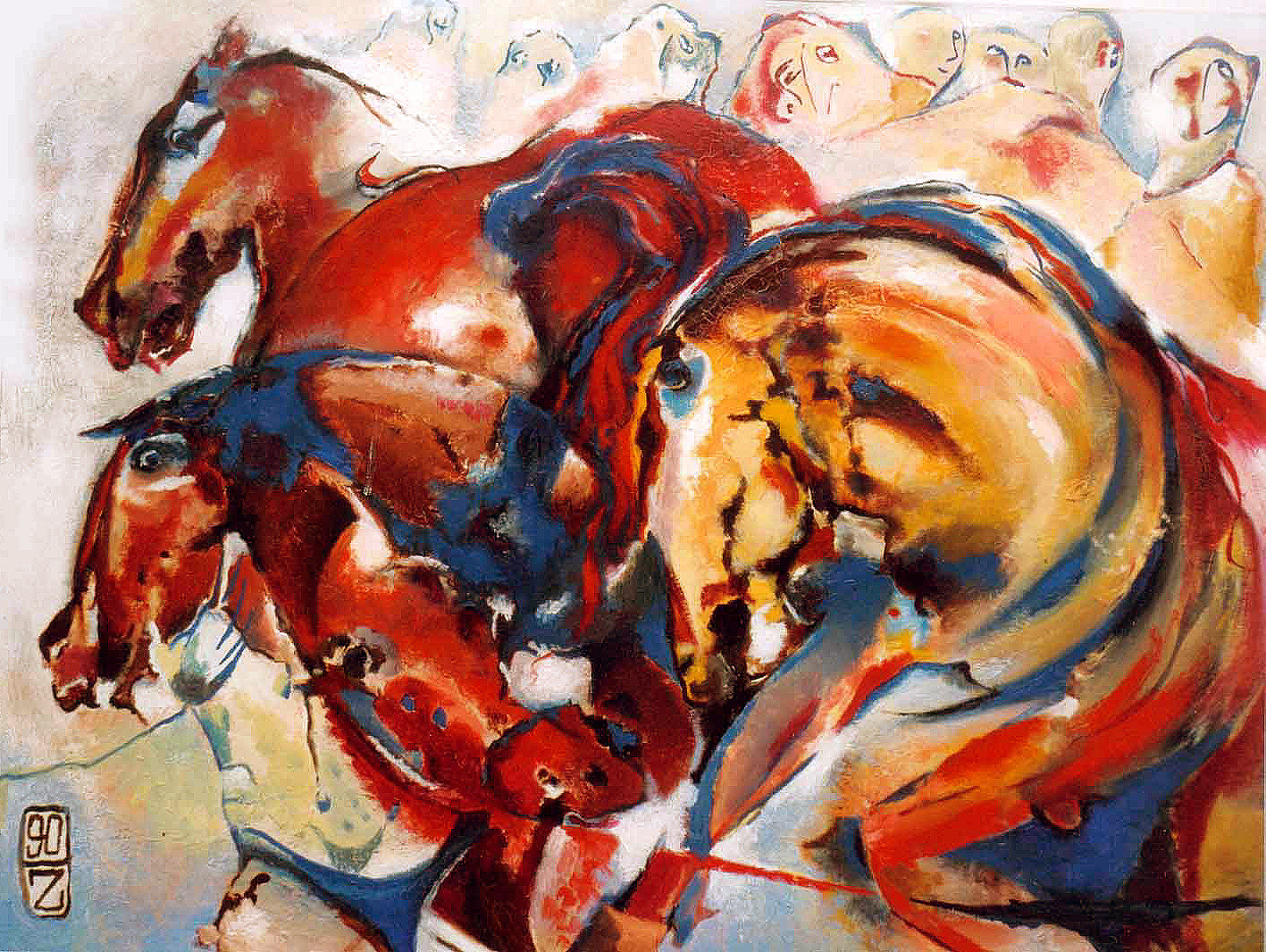 Scheuende Quadriga